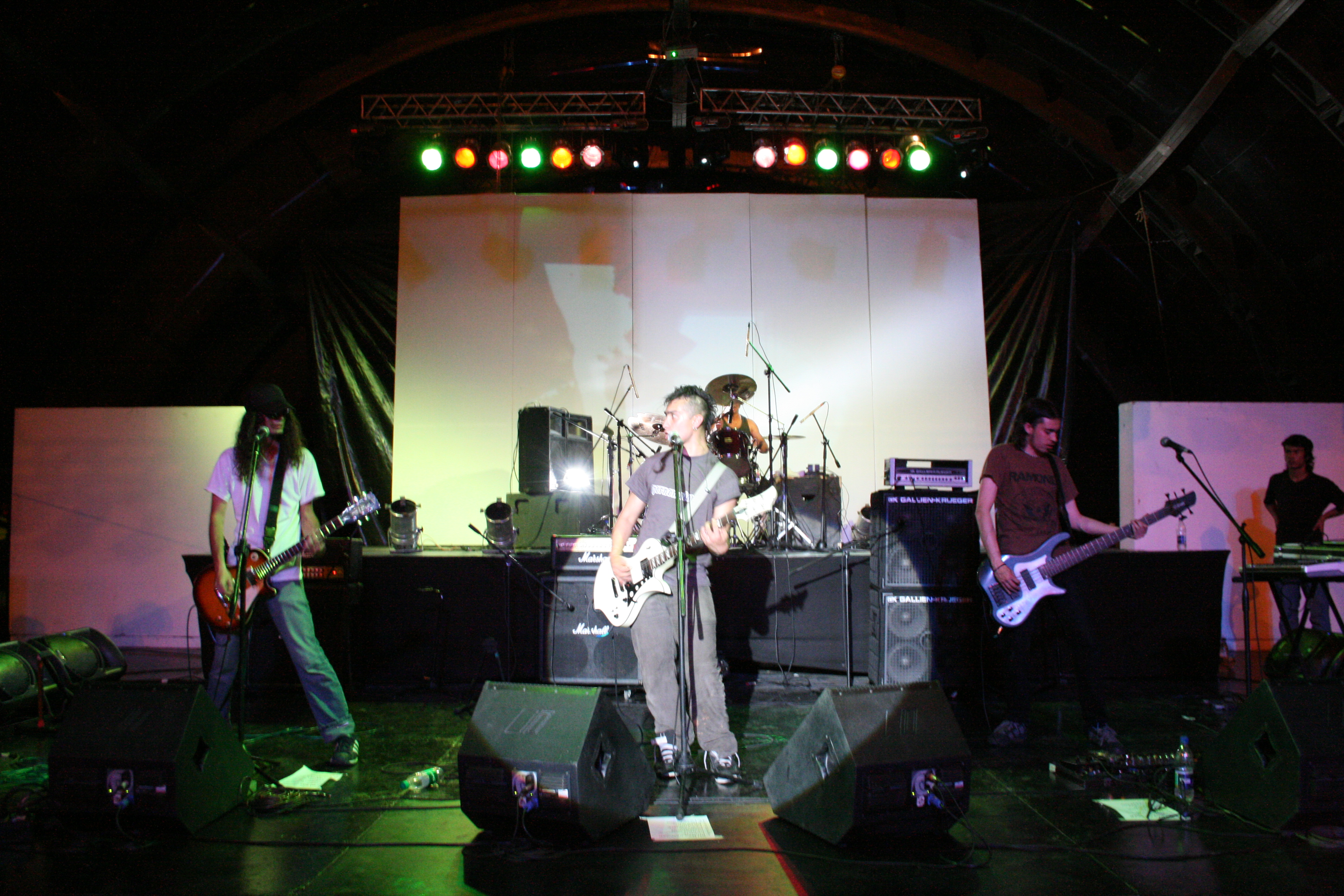 Pornomotora en Cali Underground 2008